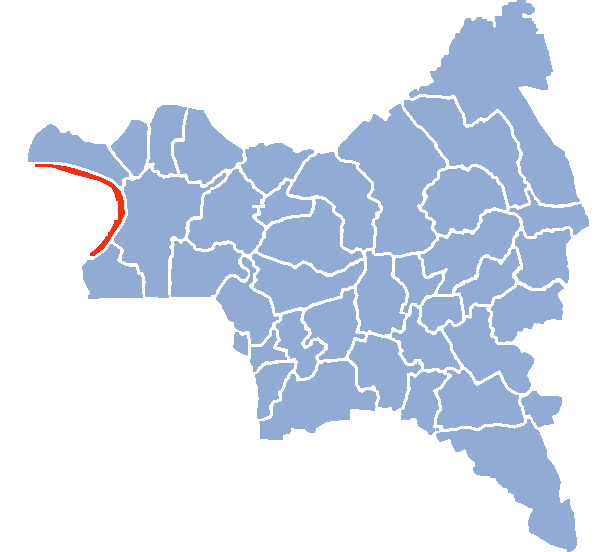 Auteur Hervé SUAUDEAU Licensing Catégorie:Cartes de Seine-saint-Denis Catégorie:L'Île-Saint-Denis